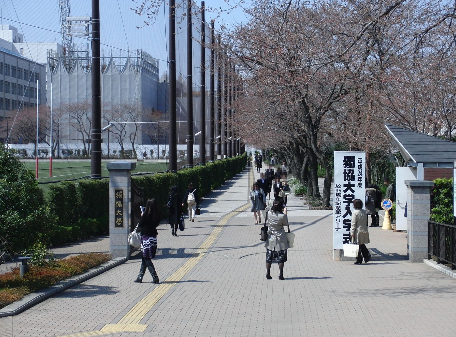 獨協大学東門